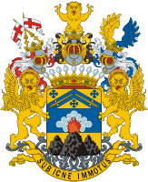 Герб рода Графов Капнистов